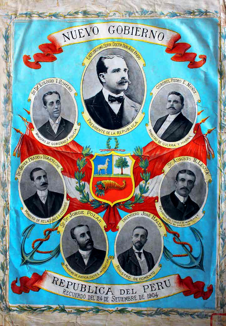 Nuevo gobierno. República del Perú, recuerdo del 24 de setiembre de 1904. José Pardo y Barreda, presidente de la República, y su Gabinete.